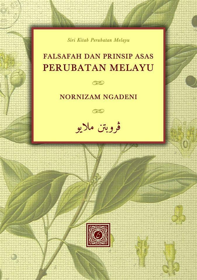 Falsafah dan Prinsip Asas Perubatan Melayu